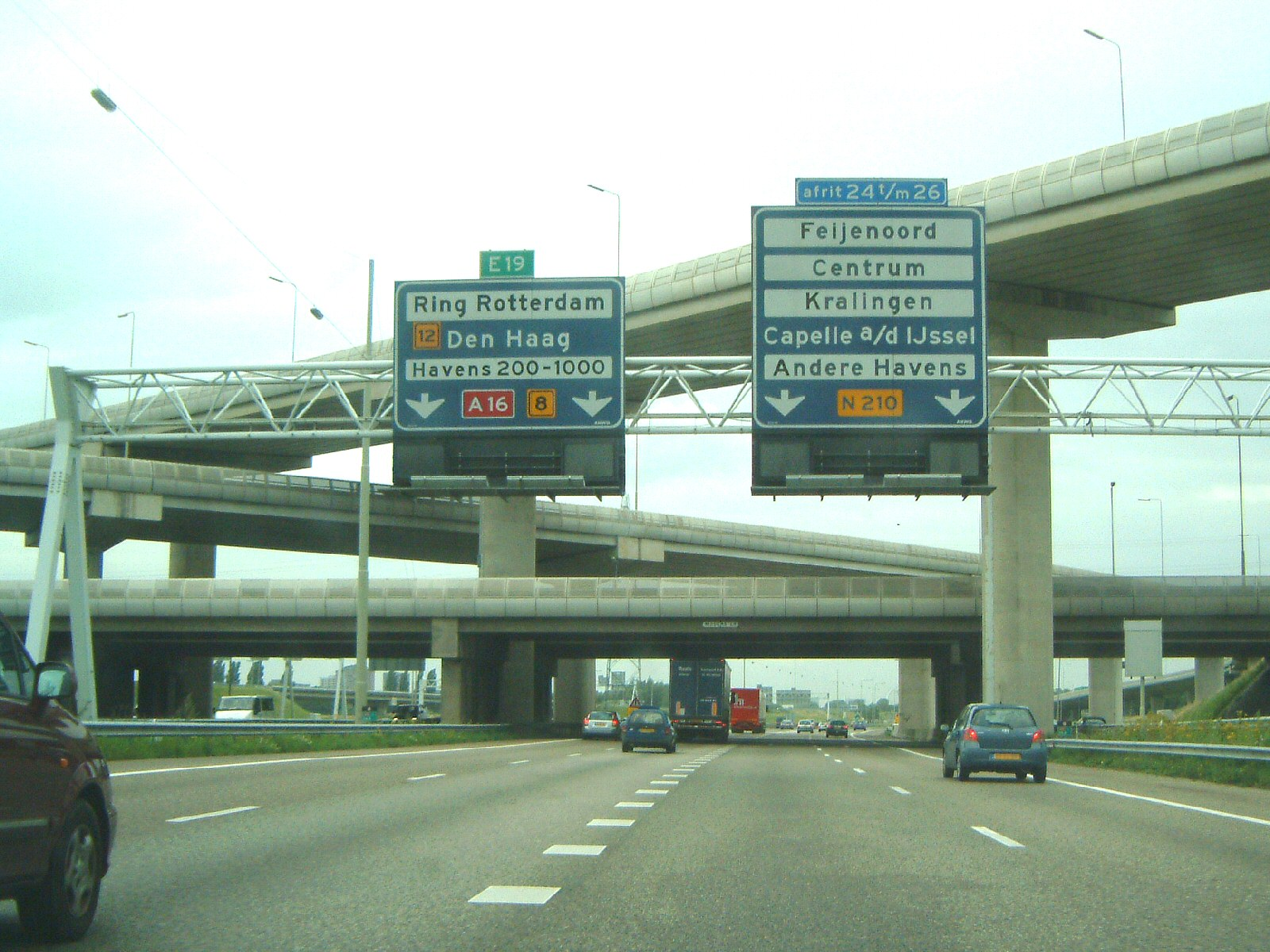 Knooppunt Ridderkerk, south of Rotterdam.